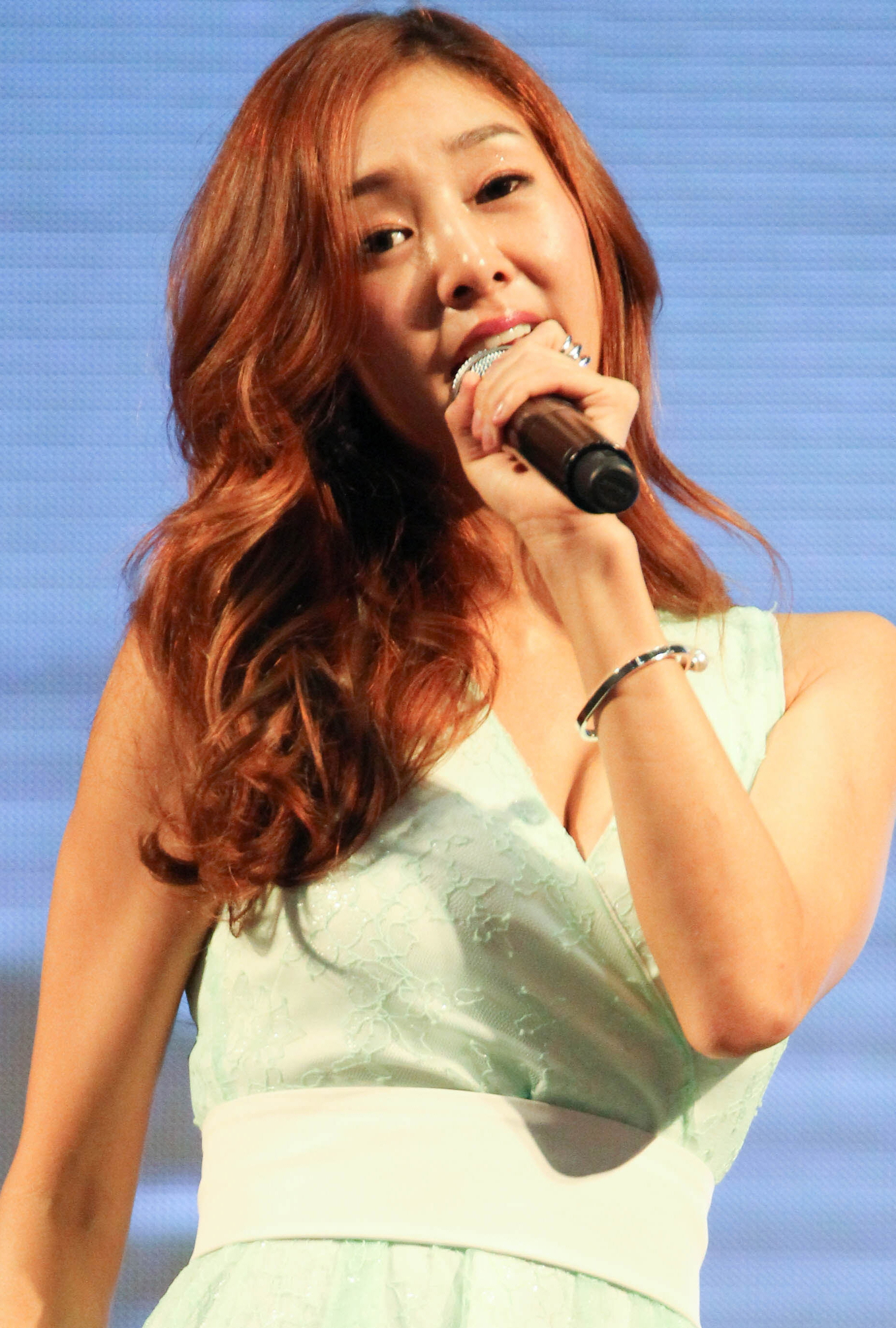 140717 케이윌의영스트리트 공개방송 (지나)